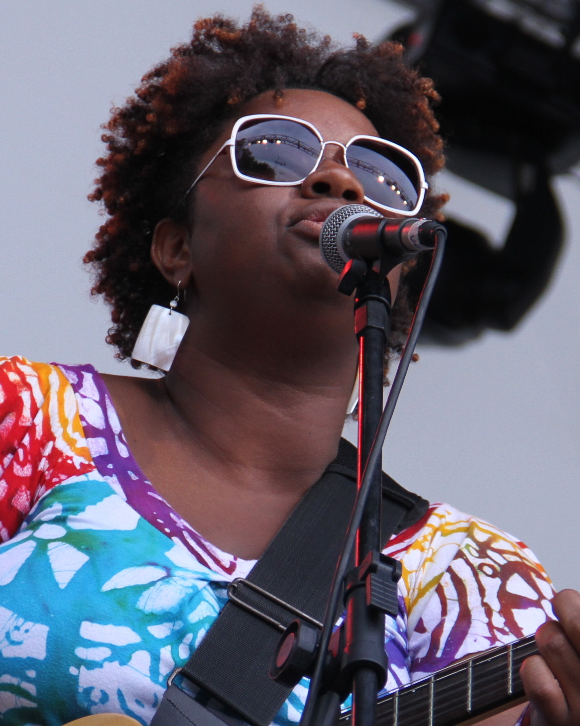 Ellen Oléria